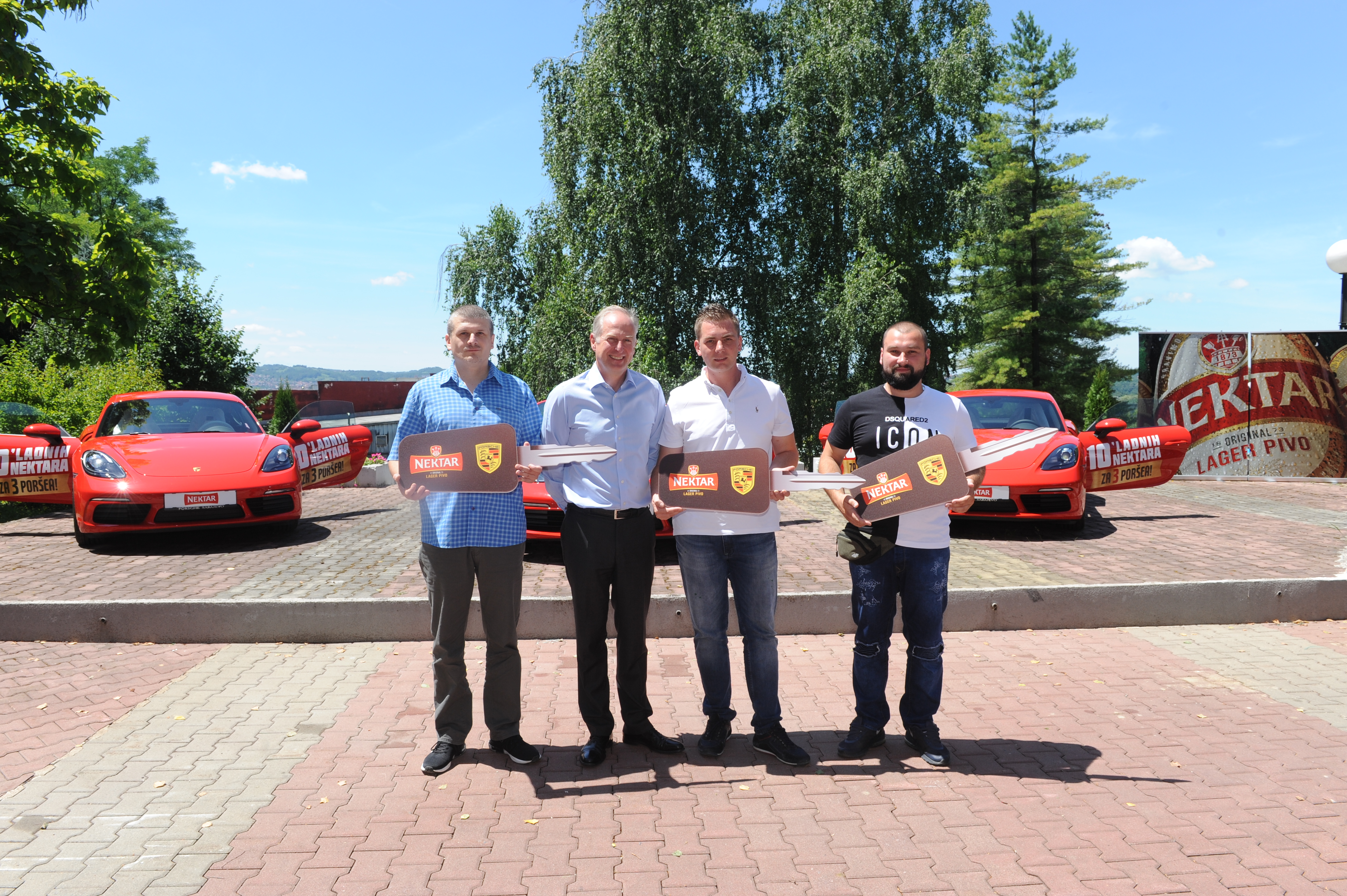 Nagradna igra "10 'ladnih Nektara"